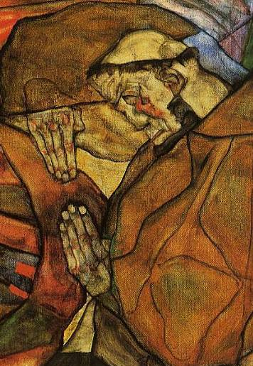 detail